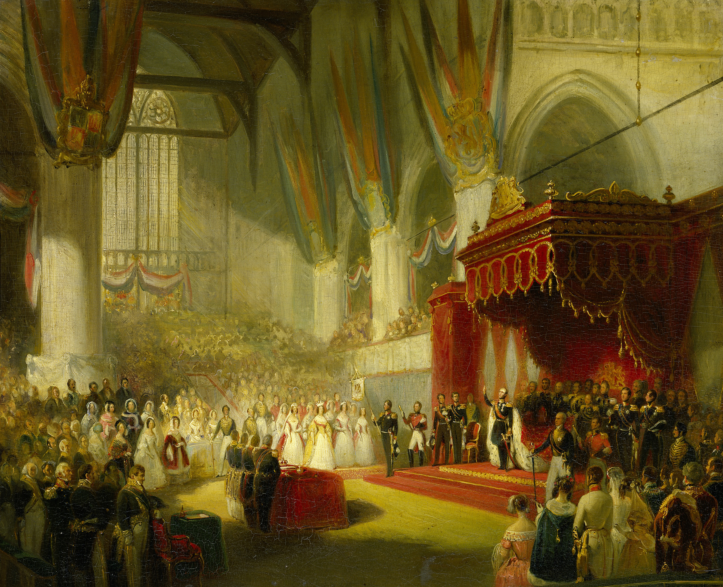 De inhuldiging van koning Willem II in de Nieuwe Kerk te Amsterdam, 28 november 1840. De koning legt rechts, staande onder een baldakijn, met opgeheven hand de eed af. Links liggen op een tafel de kroon en scepter. De kerk is gevuld met toeschouwers. Voorstudie voor het schilderij in het bezit van H.M. de Koningin (paleis Noordeinde).